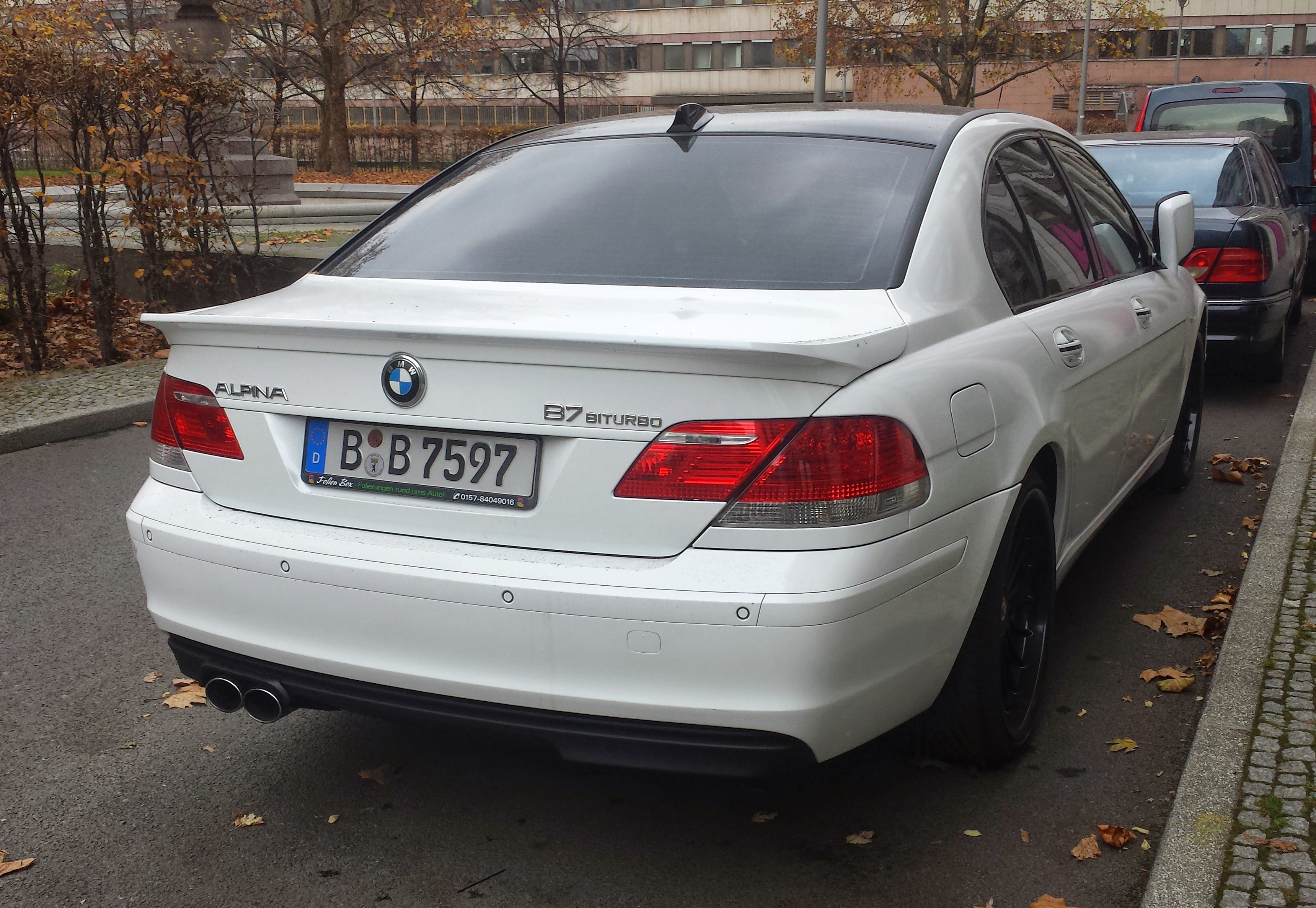 Alpina B7